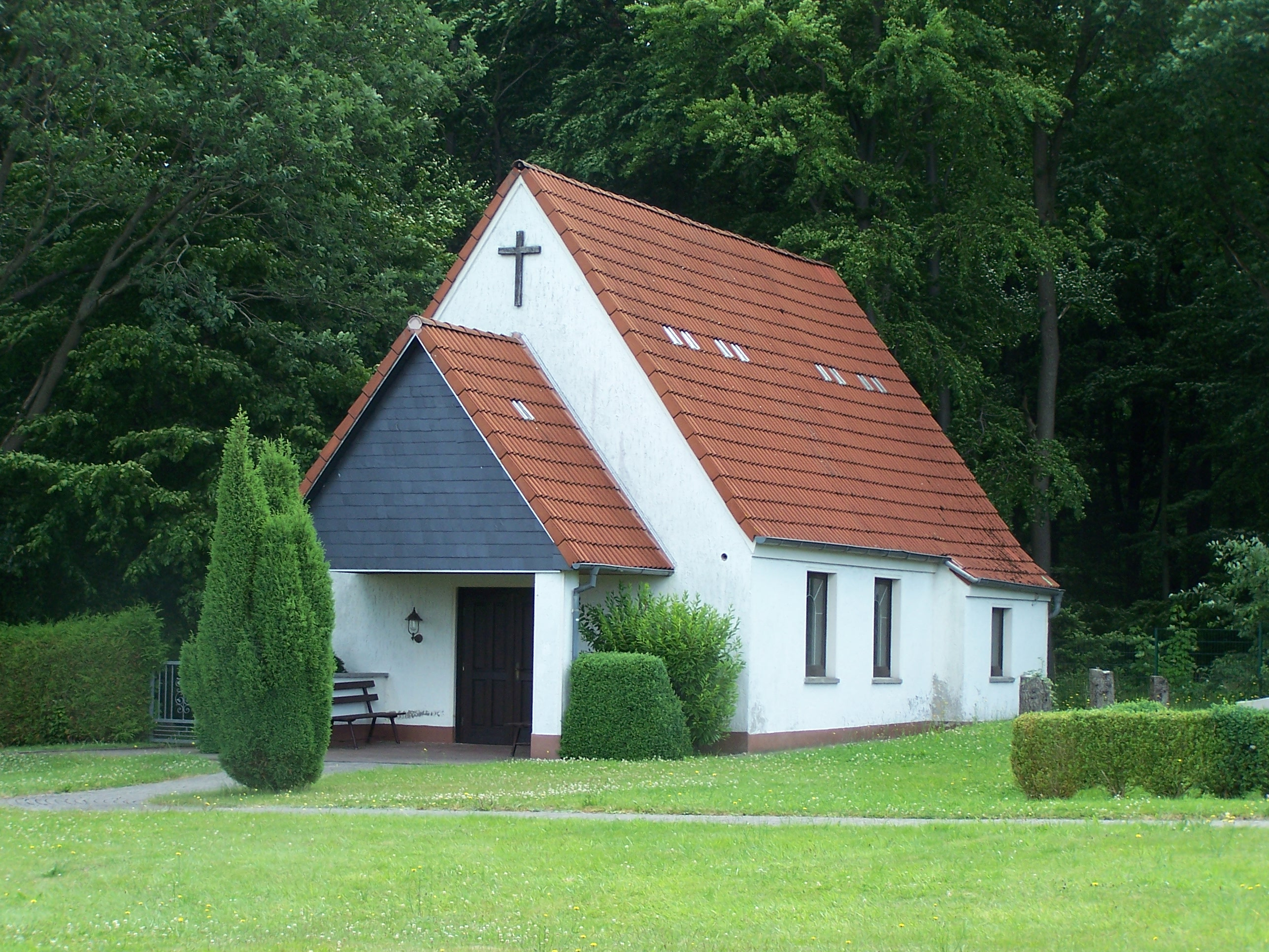 Die Kapelle auf dem Friedhof in Martinroda, Stadt Vacha.